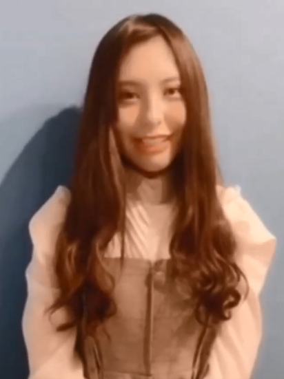 佐武宇綺です。